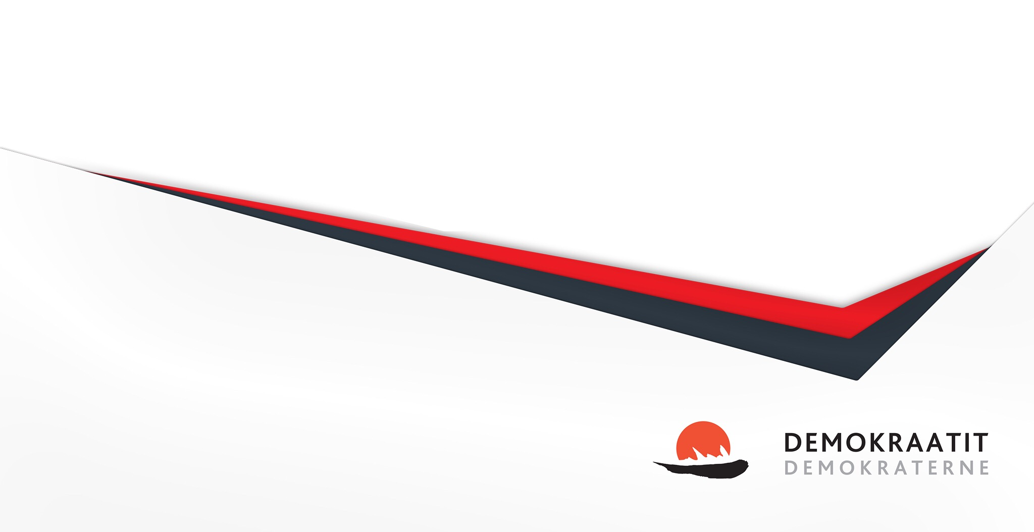 Grafik fra Demokraternes valgmateriale ved kommunalvalget 2017.